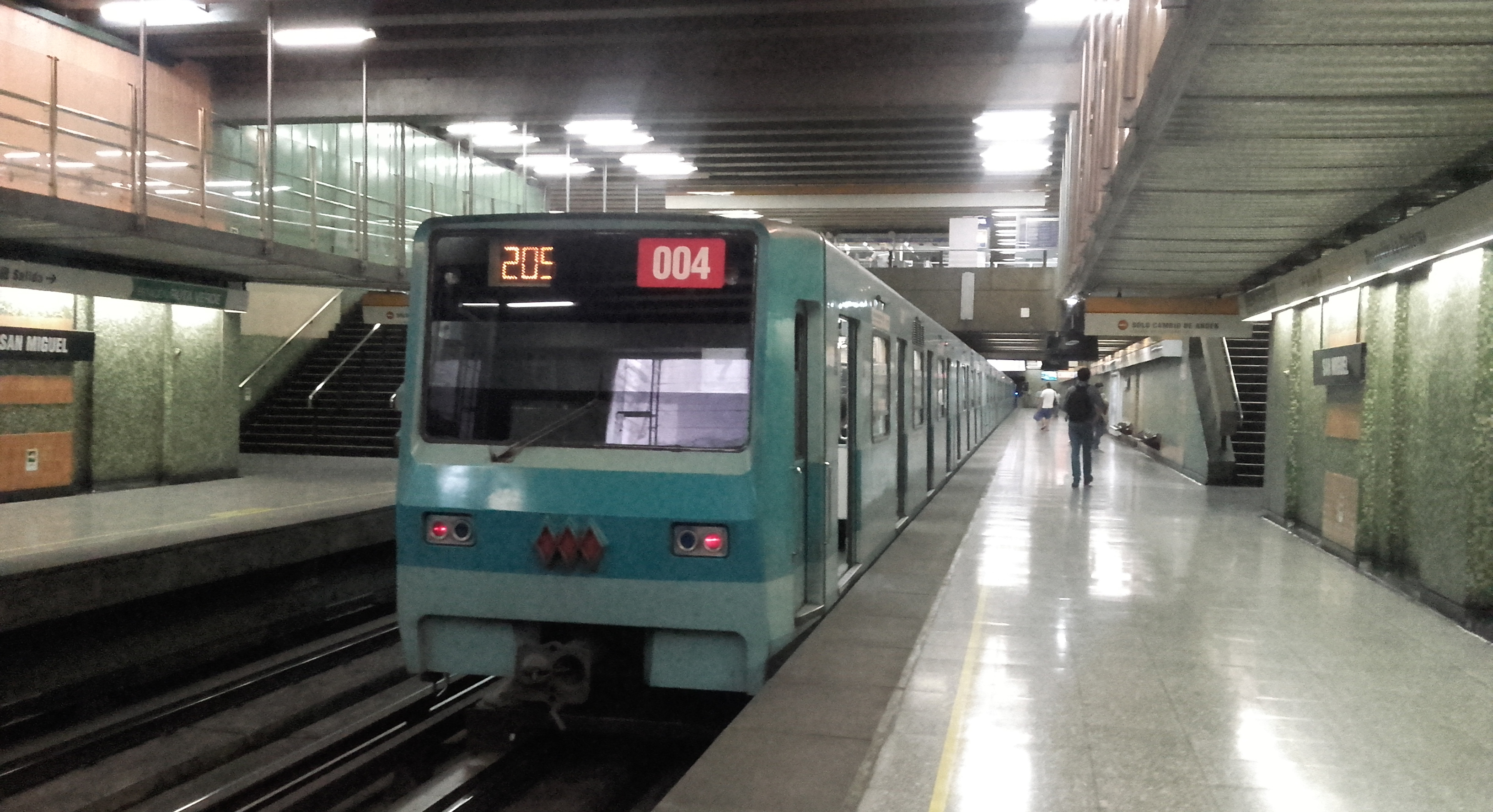 NS-74 P3004 detenido en estacion "San miguel" de Linea 2